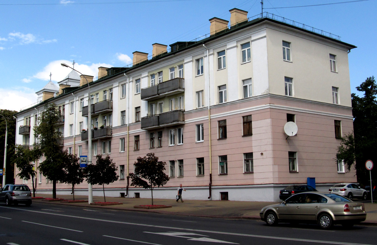 Брэст. Вуліца Леніна, 36